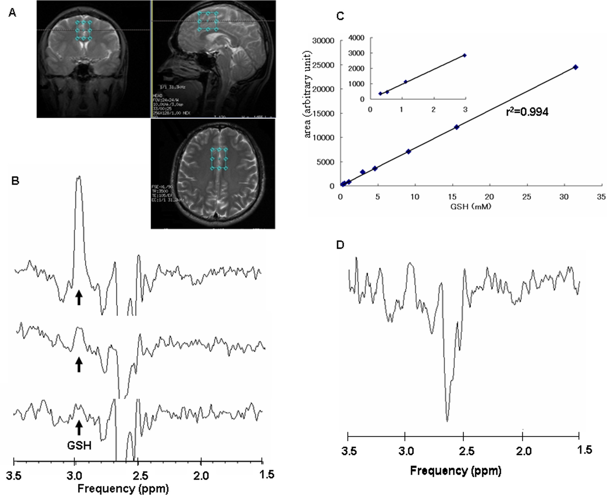 Magnetresonanzspektroskopie eines Abschnittes im Gehirn eines Patienten. Die drei MRT-Aufnahmen zeigen das türkis umrahmte Messgebiet an. Darunter die dazugehörigen NMR-Spektren mit dem Peak von Glutathion (GSH). Rechts oben das daraus abgeleitete Diagramm aus Signal (y-Achse) und Konzentration (x-Achse).